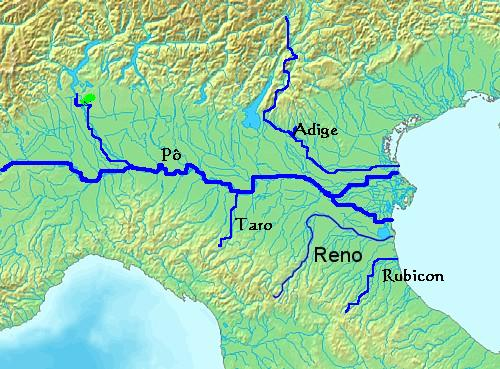 Création personnelle Fond de carte : Image:LocationPoRiver.PNG.